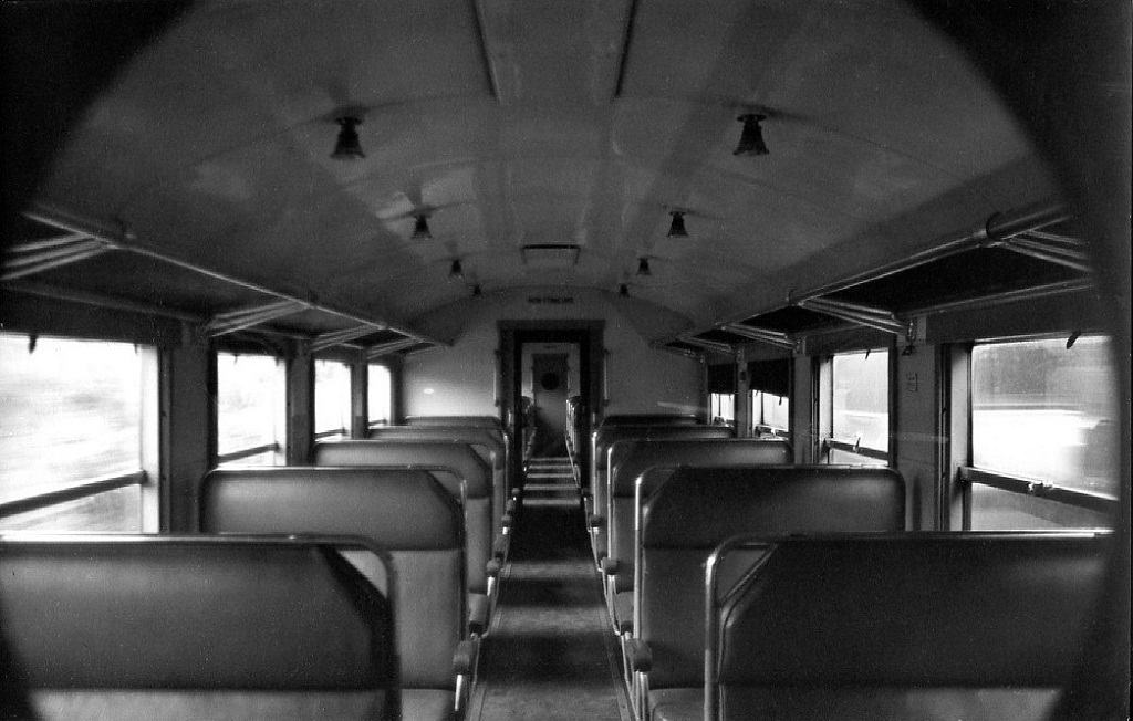 Intérieur d'une voiture modernisée dite "Bruhat"